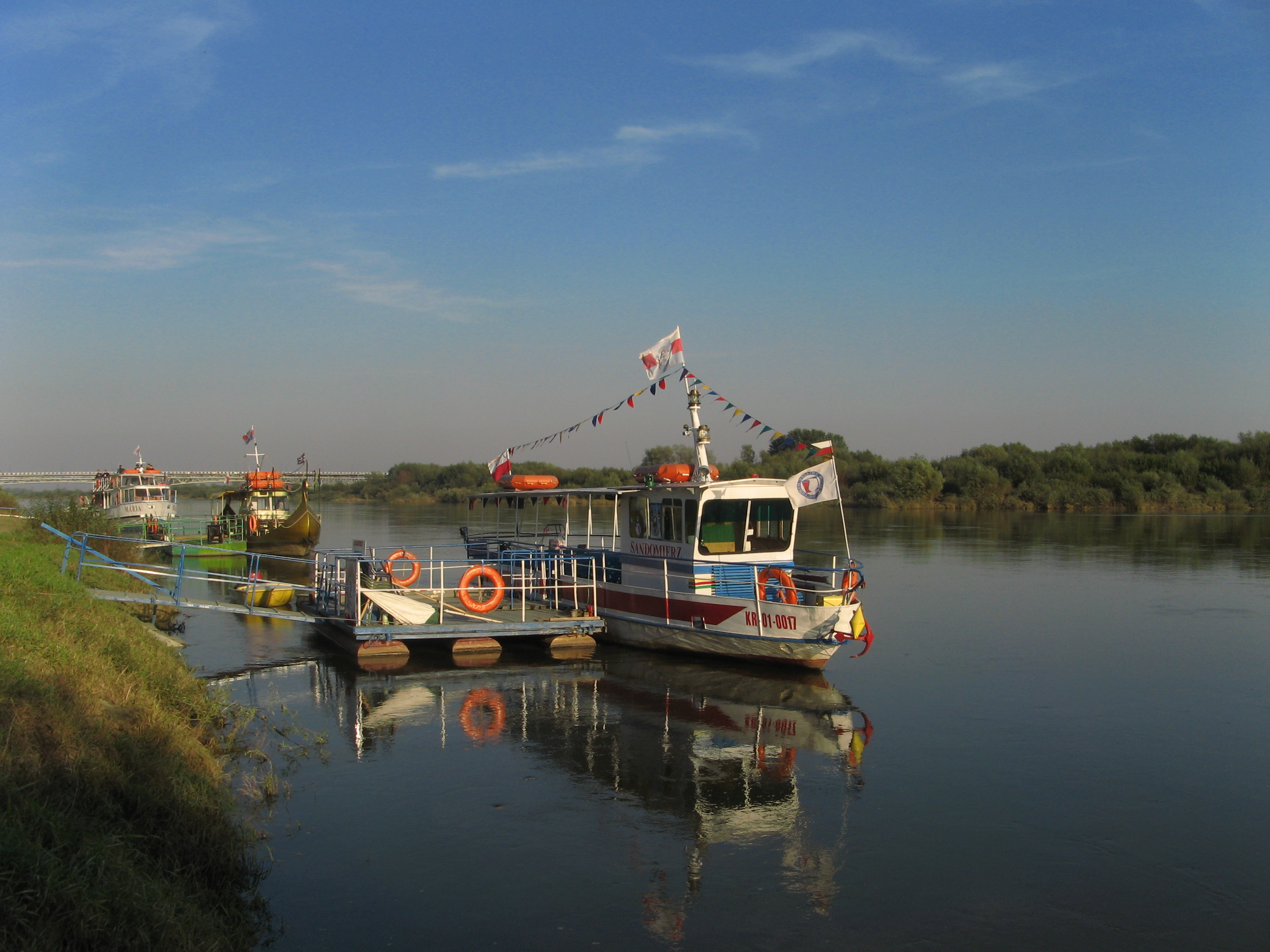 Sandomierz